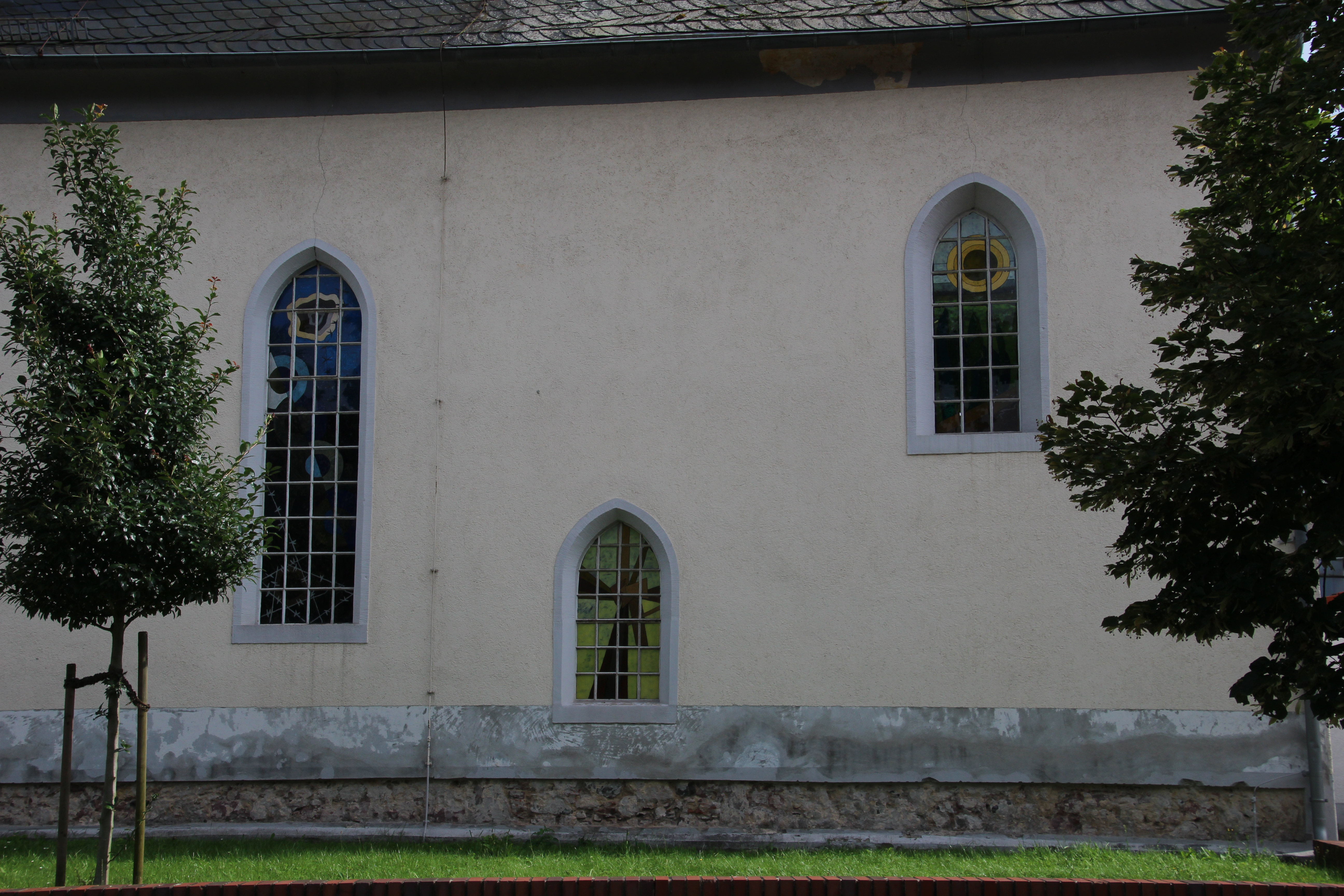 Ev. Kirche